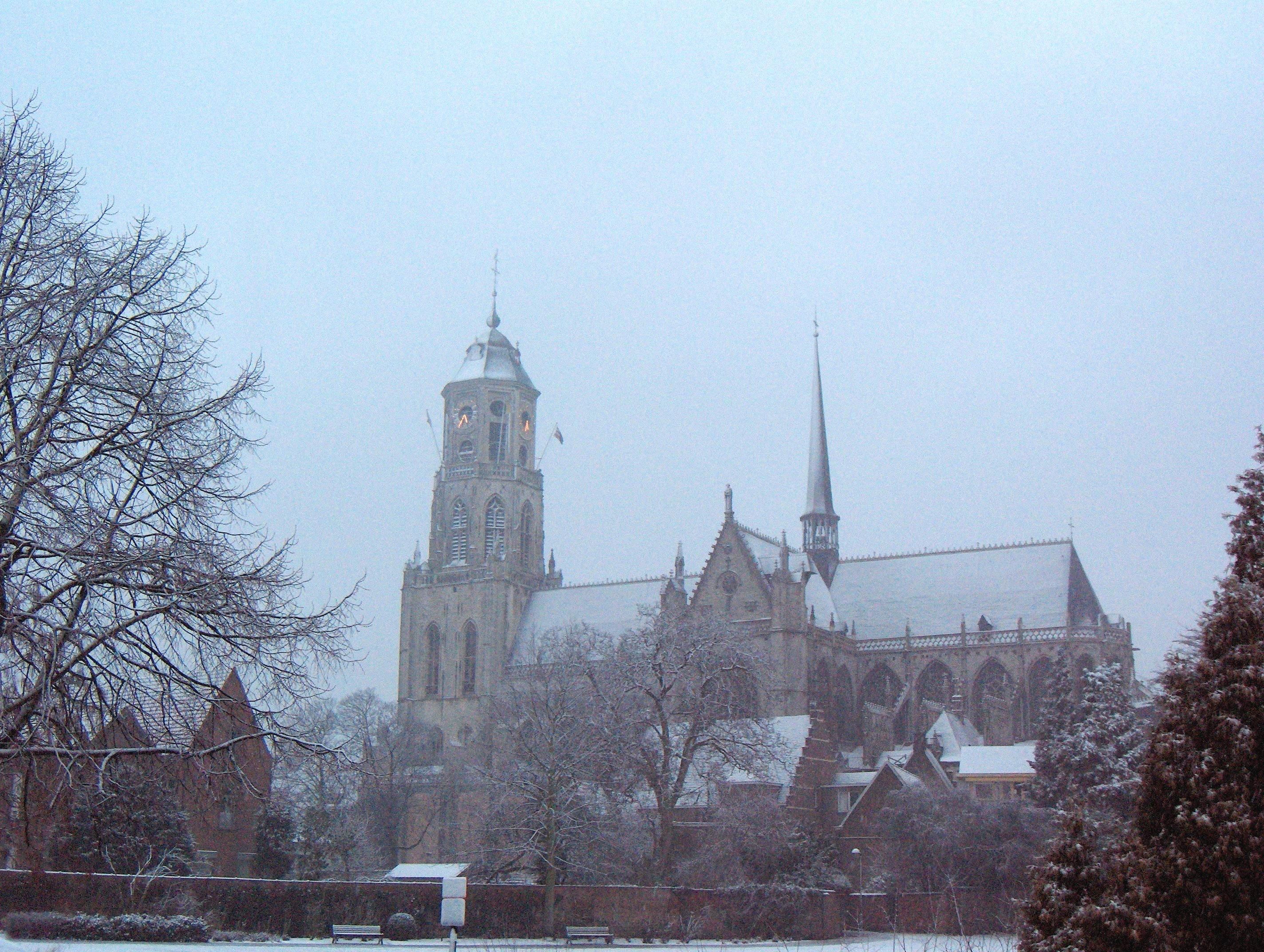 Beschreibung: Lier (Belgien, Prov. Antwerpen), Sankt-Gommaruskirche. Datum: 12. Februar 2006 Fotograf:Friedrich Tellberg